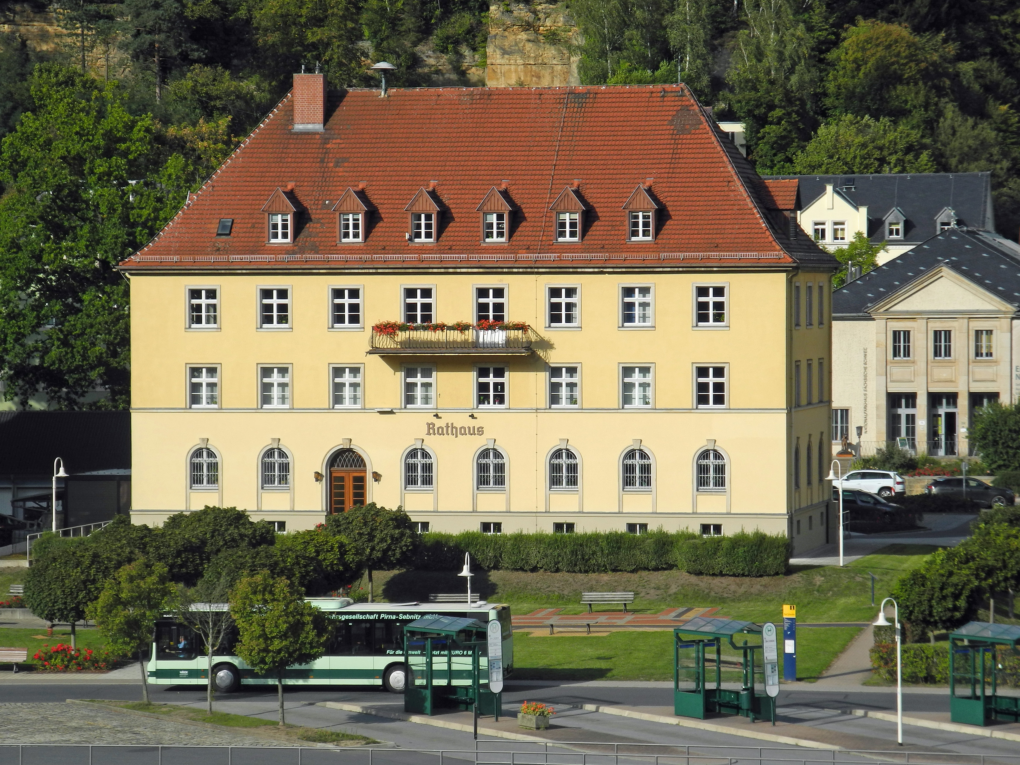 Blick von der Straßenbrücke über die Eisenbahn auf das Rathaus von Bad Schandau, Dresdner Str. 3